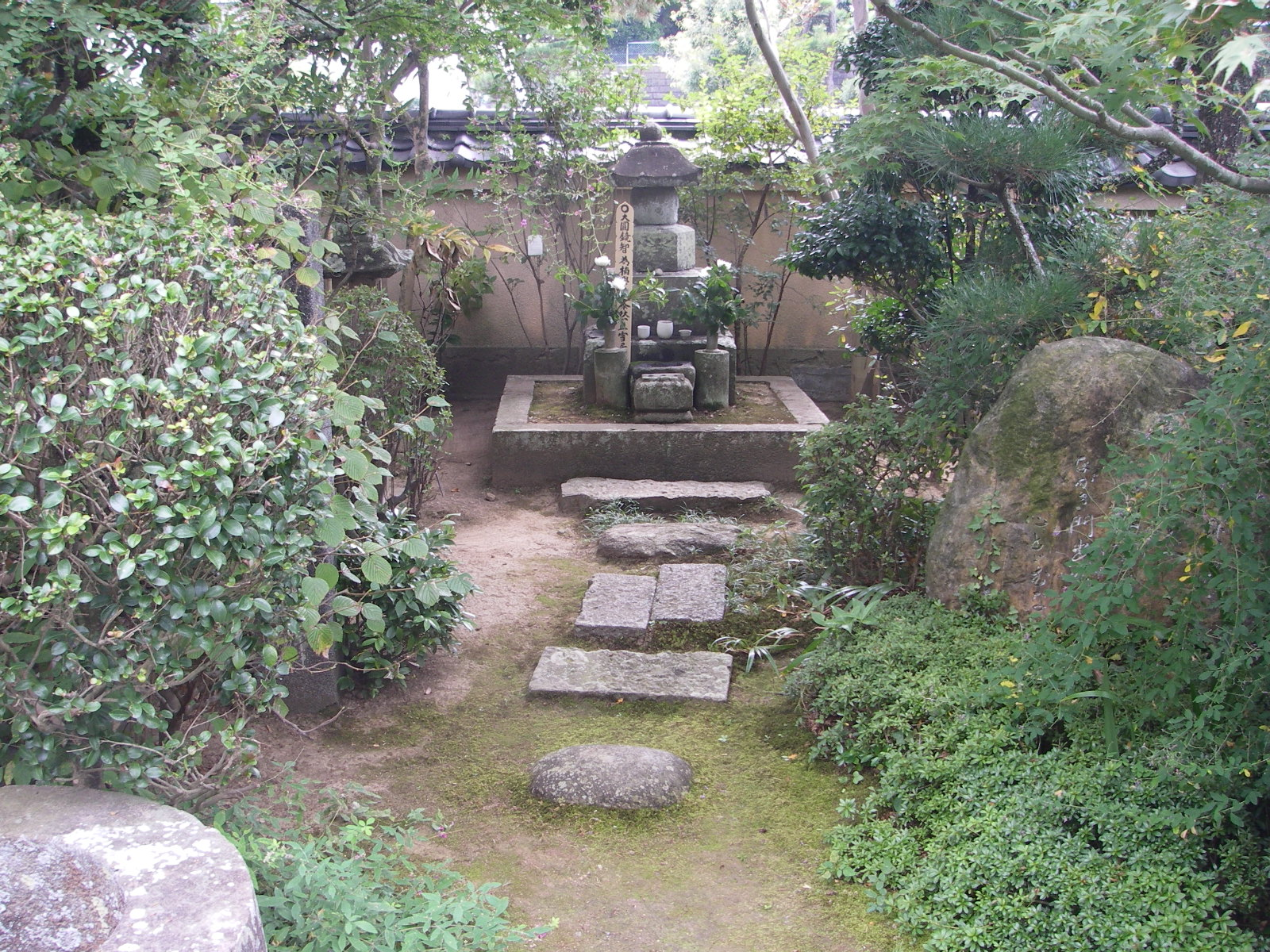 由比正雪公首塚